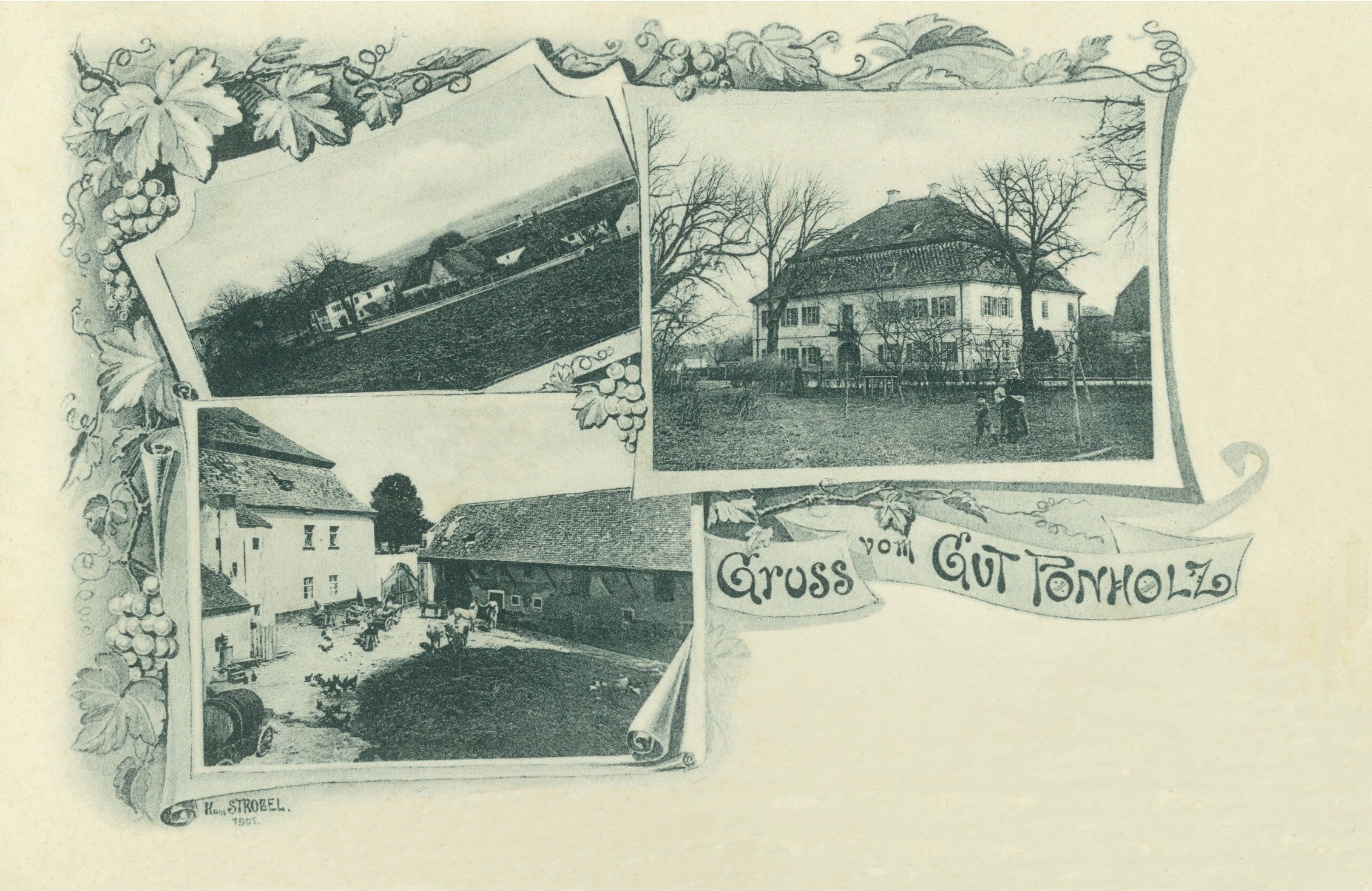 Verschiedene Ansichten von Gut Ponholz